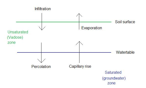 Water balance factors in root zone